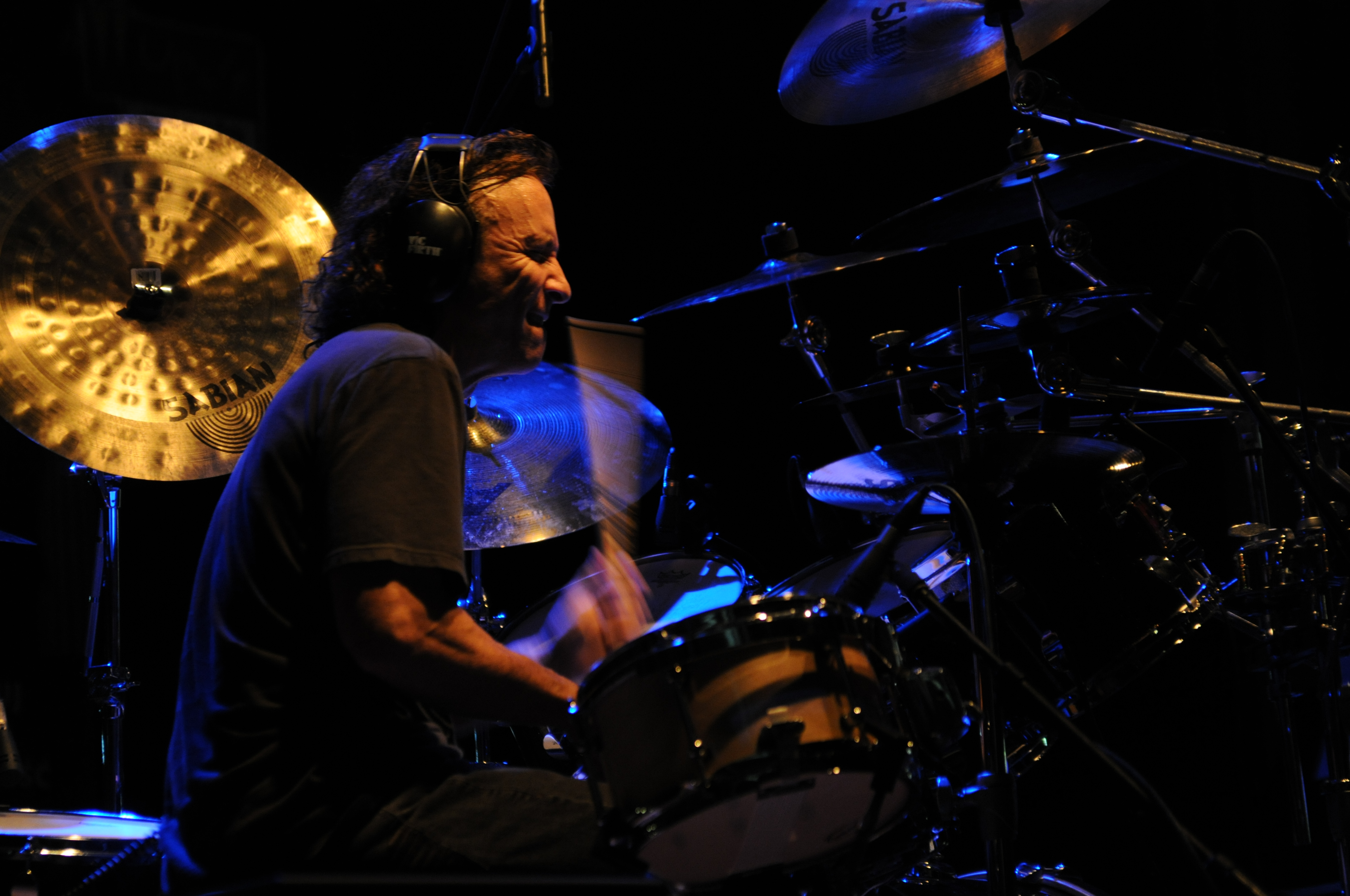 Rod Morgenstein